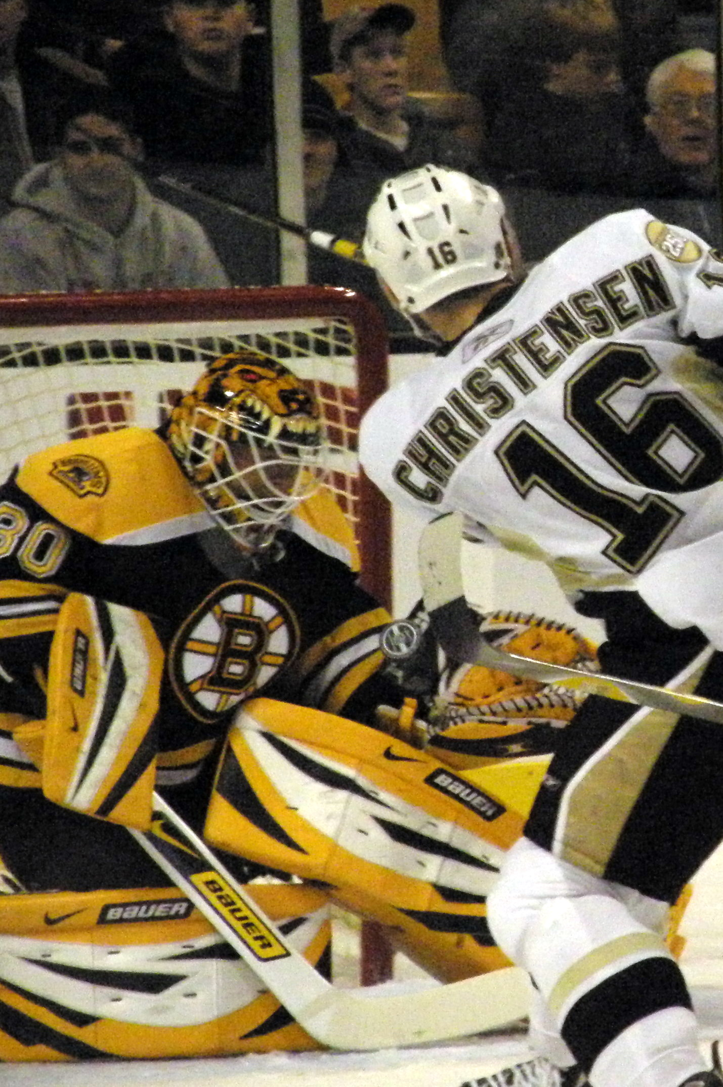 Tim Thomas #30 (goalie) makes a save against #16 Erik Christensen